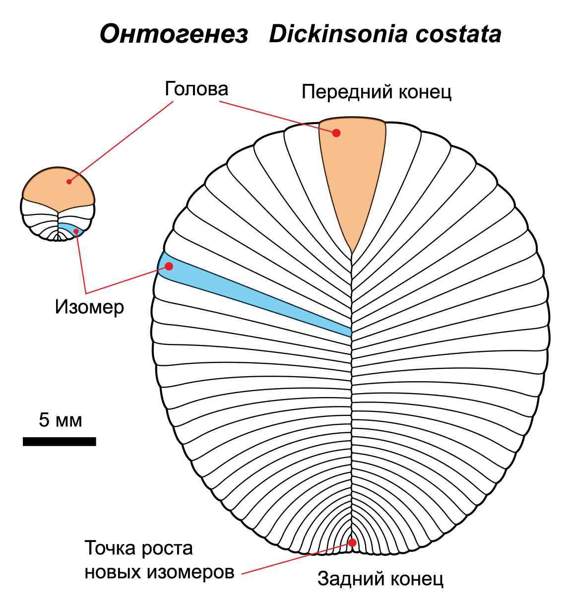 Онтогенез дикинсонии, одного из самых распространённых животных вендского периода